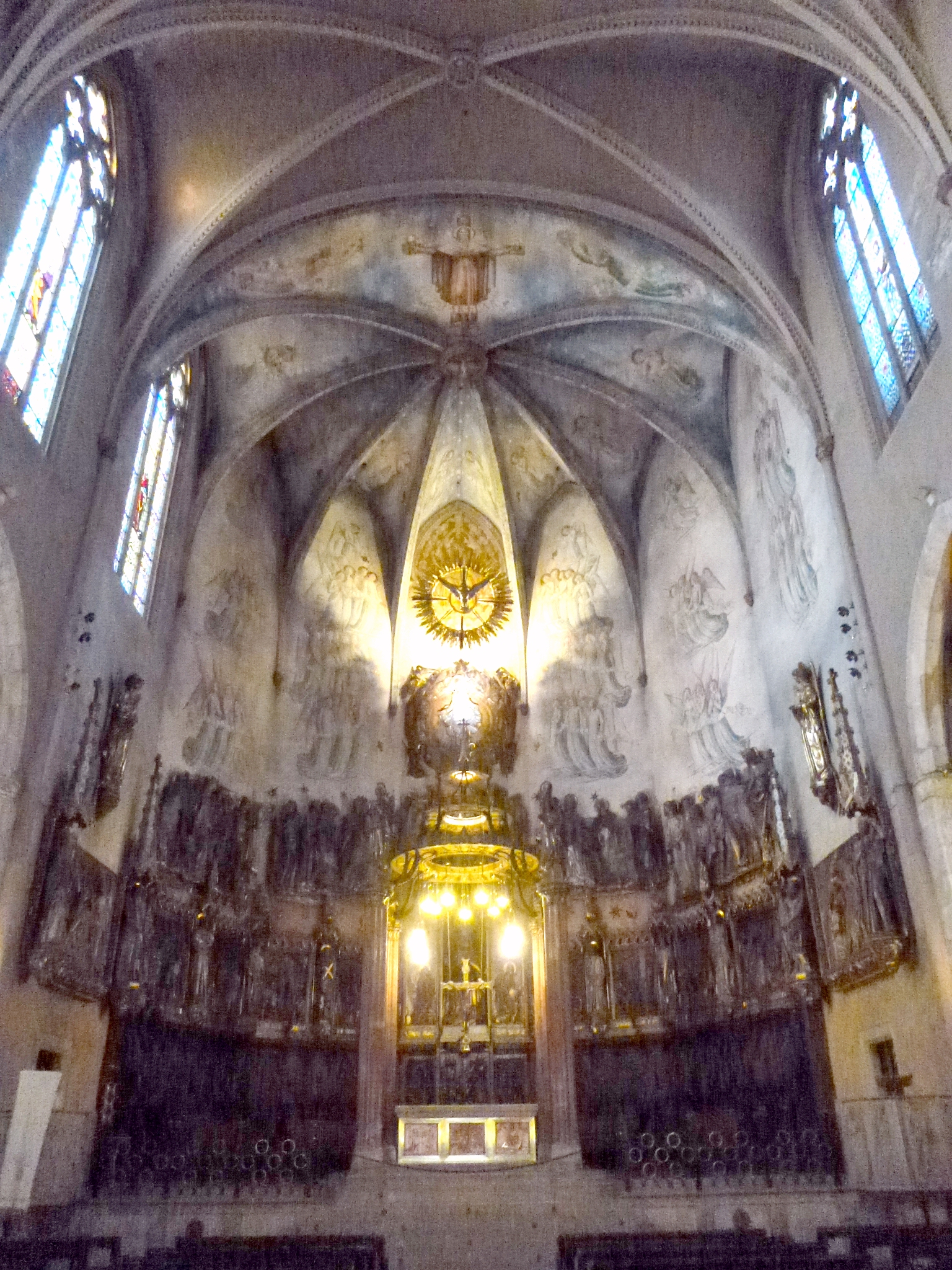 Catedral de Tarrasa (Barcelona)